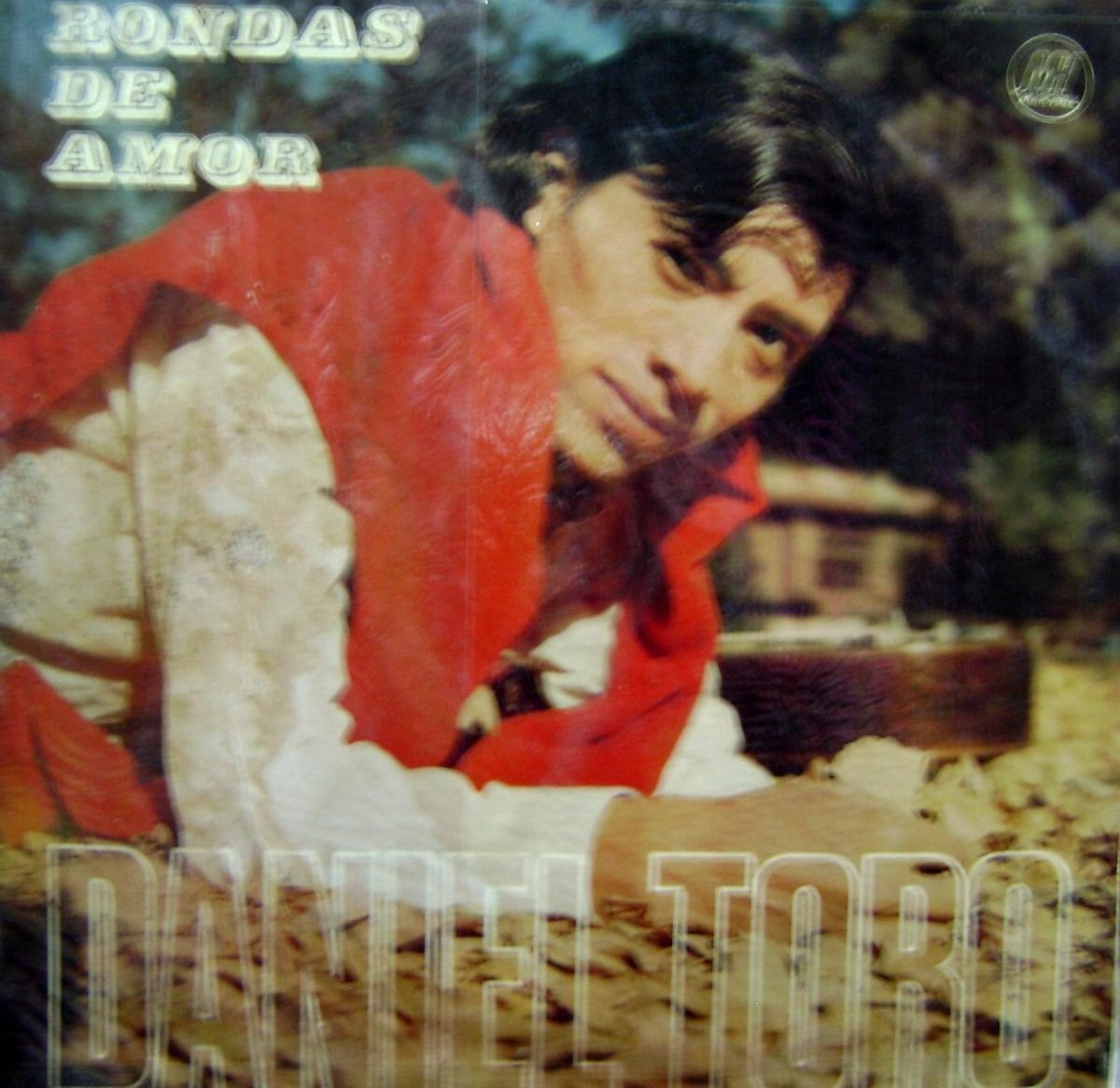 Daniel Toros